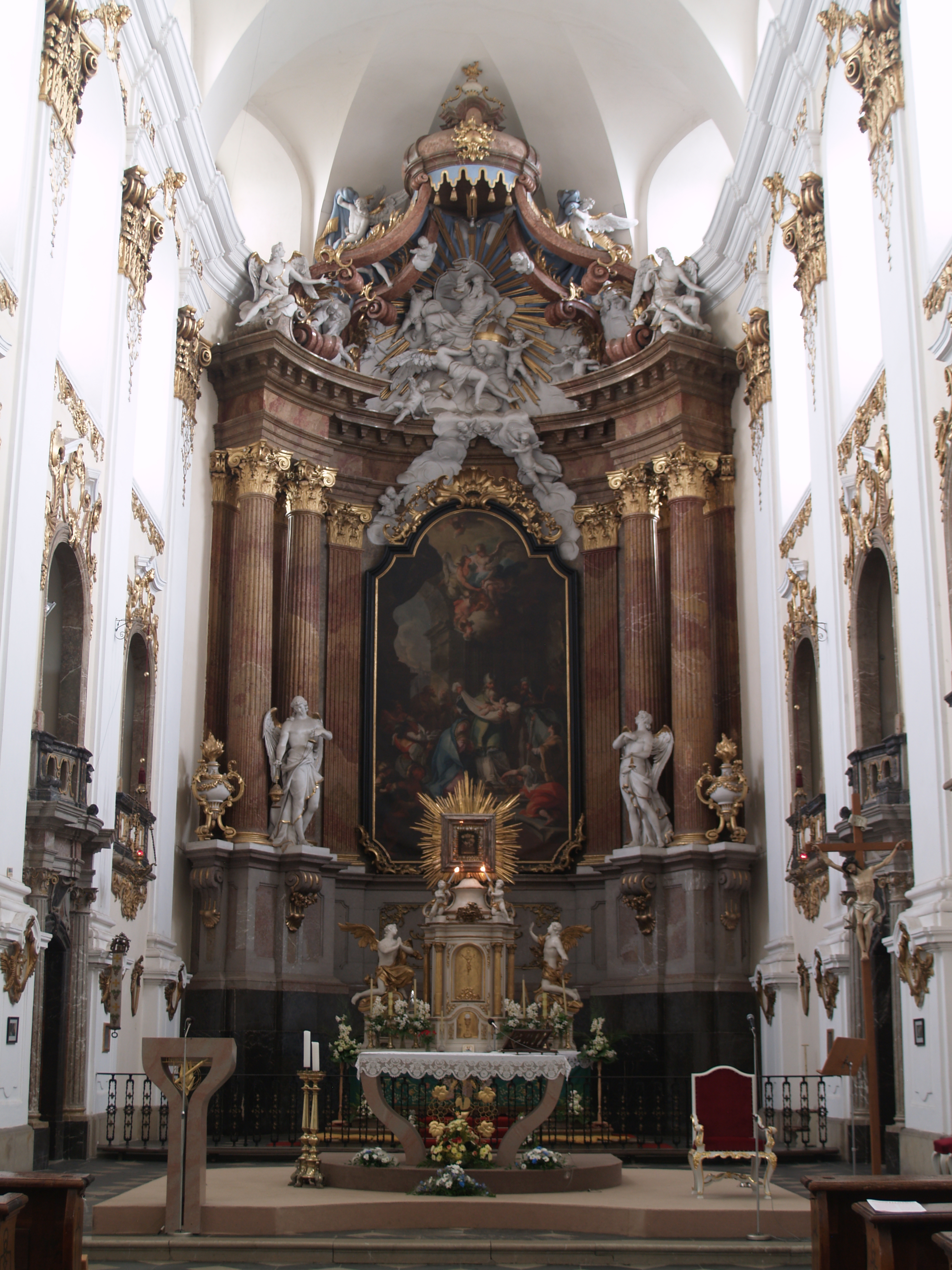 Franz Kohl je zde proslulý svým klasicizujícím stylem demonstrovaný na dvojici andělů s vázami